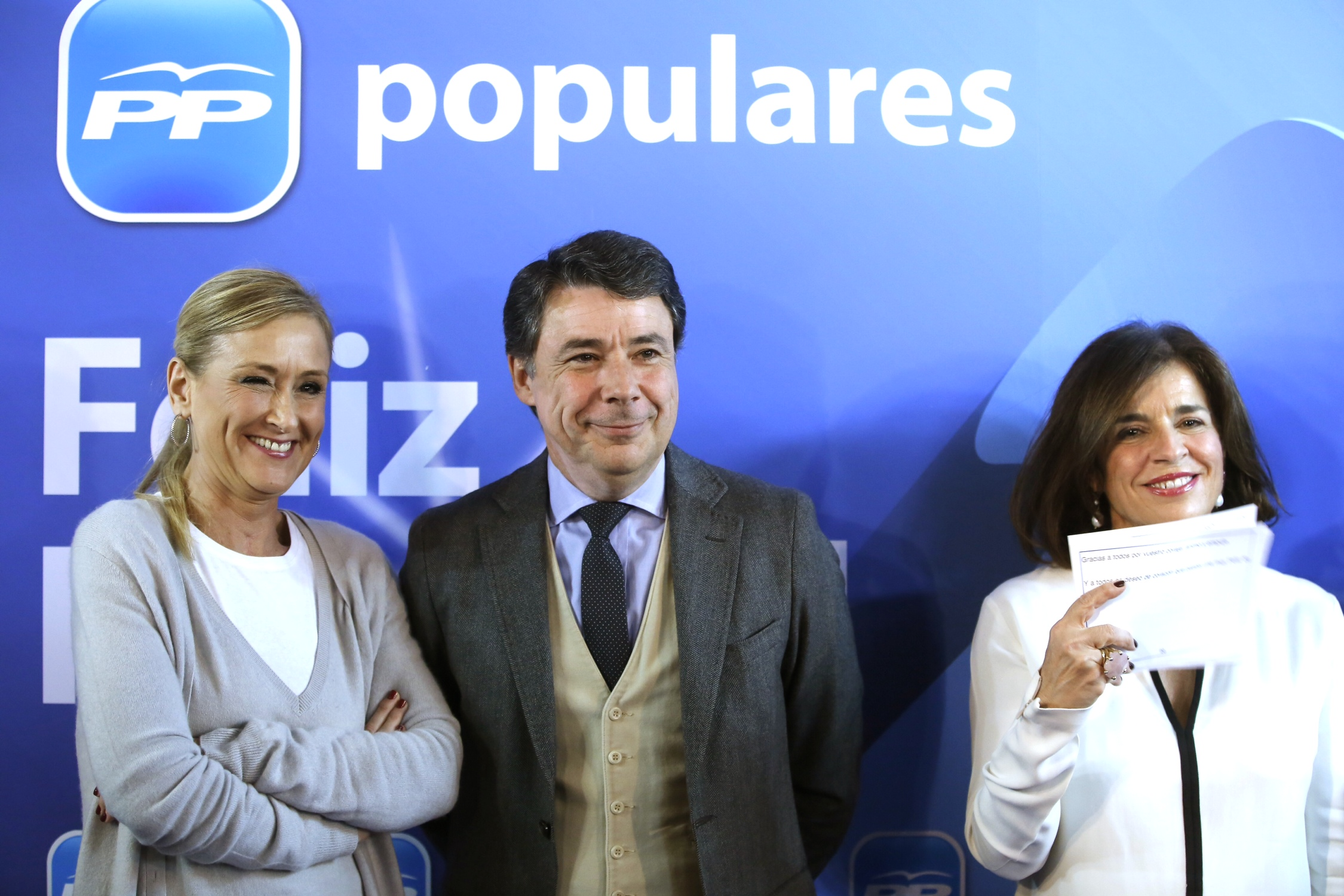 Encuentro con afiliados del PP de Villa de Vallecas